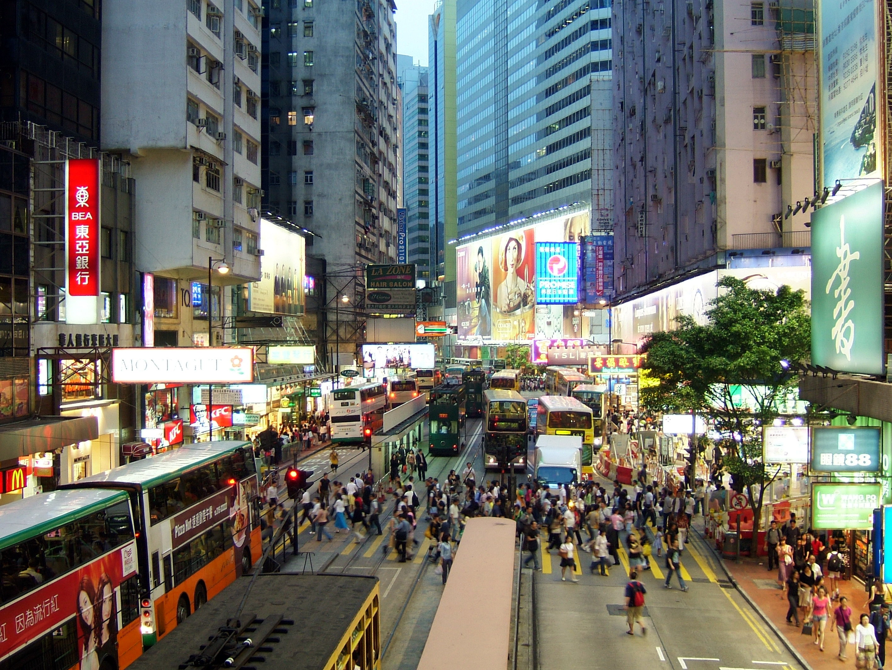 Hong Kong citizens